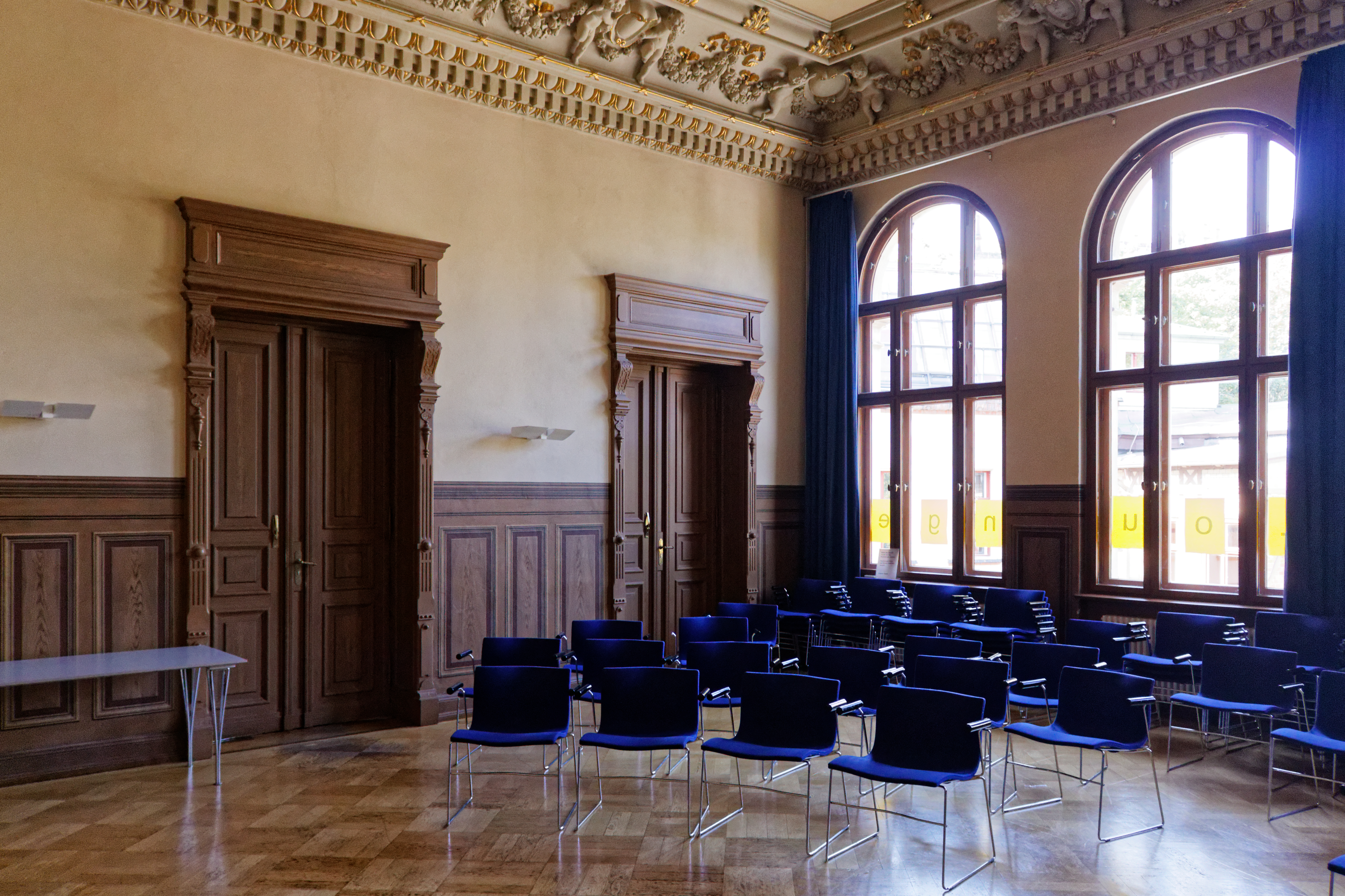 Puttensaal im Marienbad Berlin-Wedding